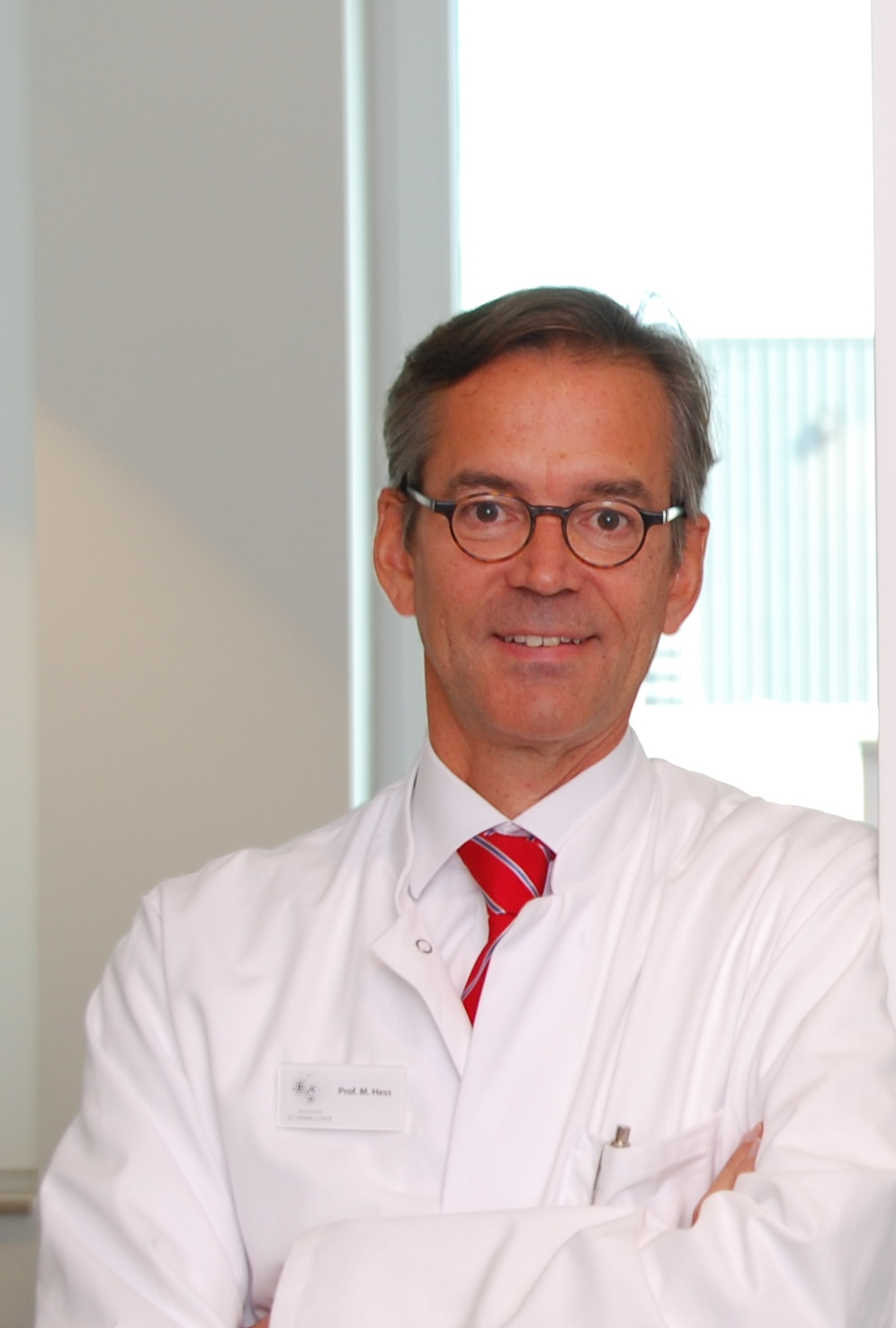 Prof. Markus Hess.